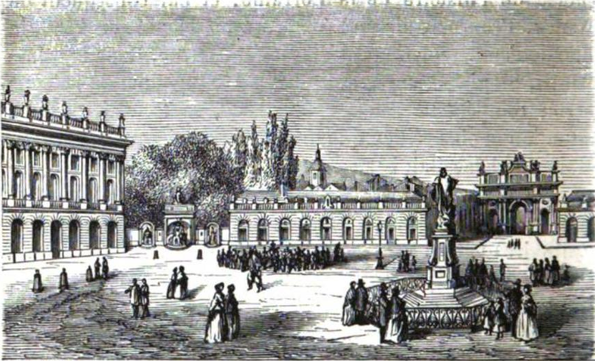 La place Stanislas de Nancy vers le milieu du XIXe siècle